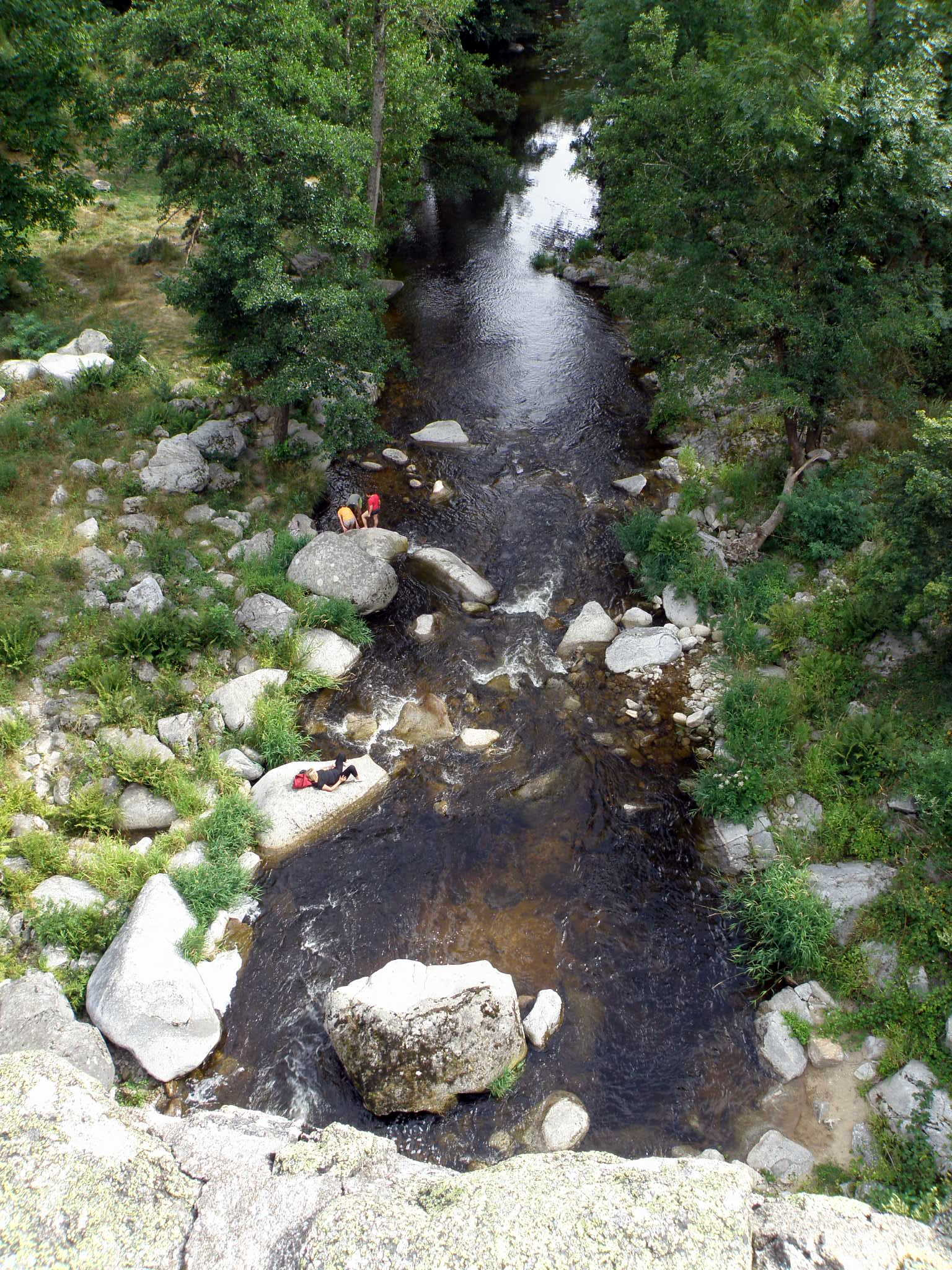 Chalencon, hameau appartenant à la comm. de Saint-André-de-Chalencon, dép. de la Haute-Loire, France (région Auvergne). Vue de la rivière l'Ance, prise depuis le pont du Diable, en contrebas du bourg de Chalencon, pont dont on aperçoit le haut du parapet tout en bas de la photo.